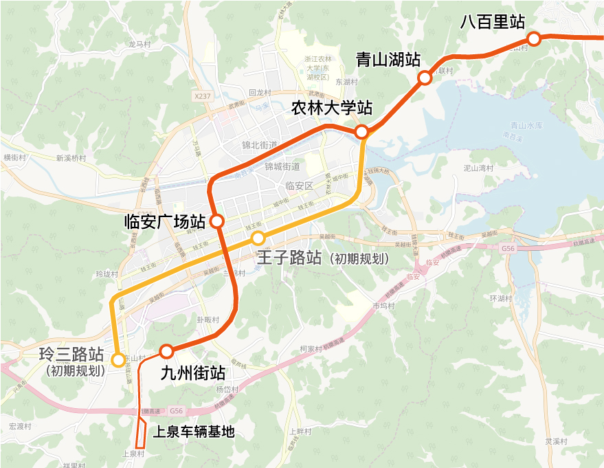 中文（中国大陆）: 杭临线建设时临安段更改的线路走向